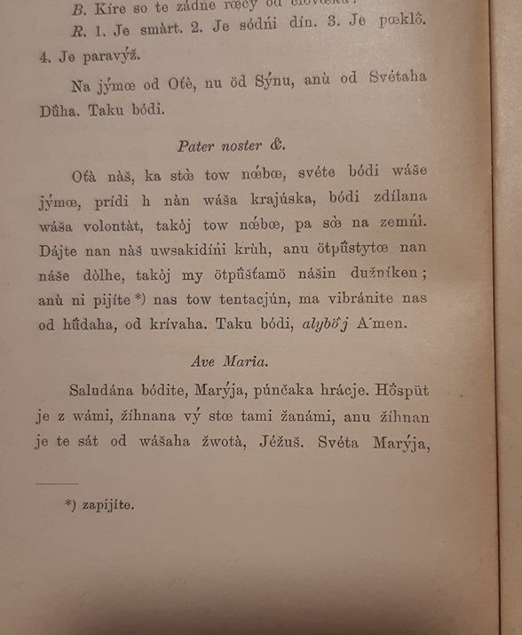 Padre nostro in Resiano - da Il Catechismo resiano di Jan Baudouin de Courtenay